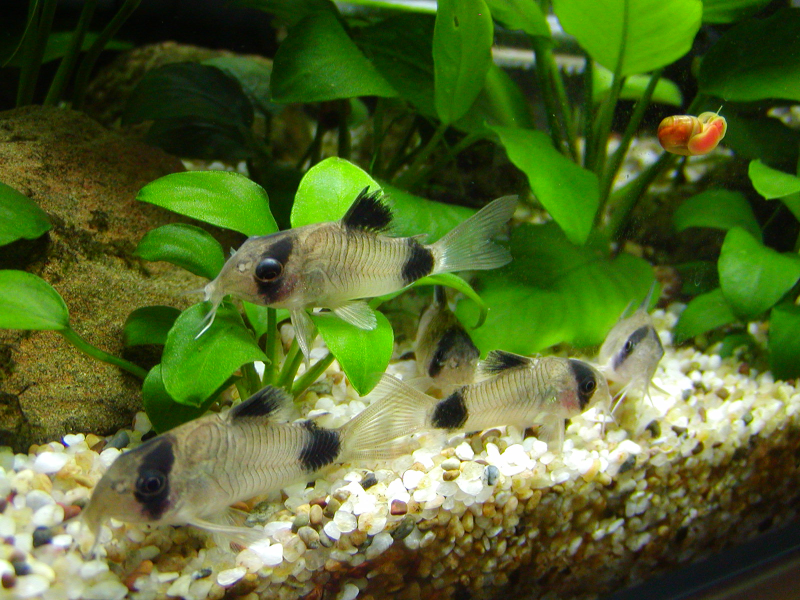 Corydoras panda (眨眼中)